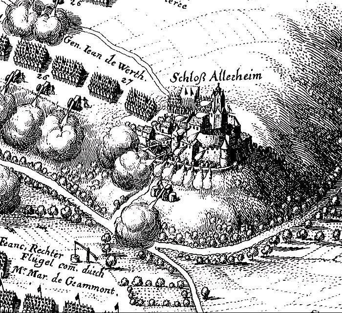 Schloss Alerheim